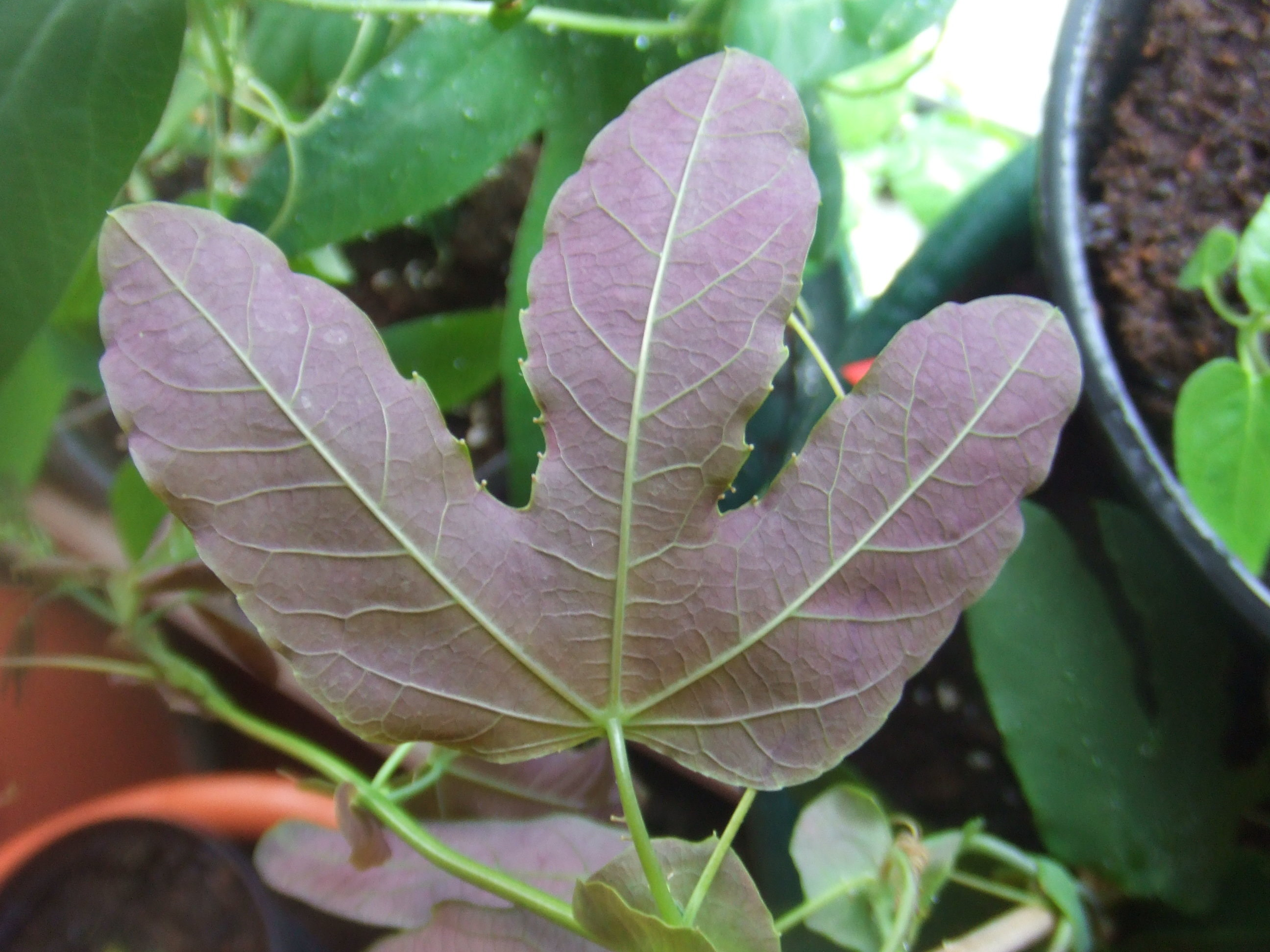 Onderkant van het blad van Passiflora kermesina, eigen collectie